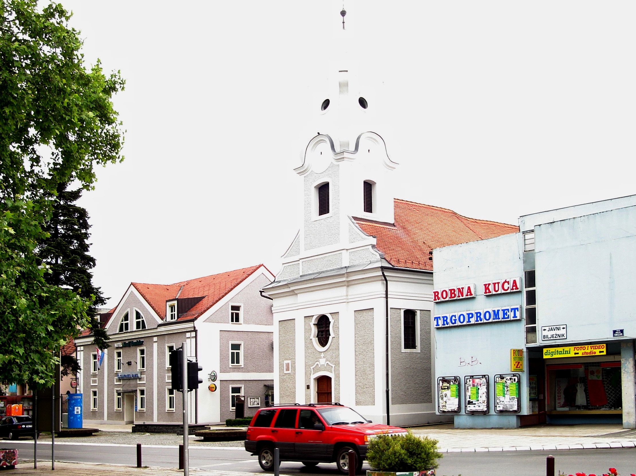 Bild der Theresienkirche